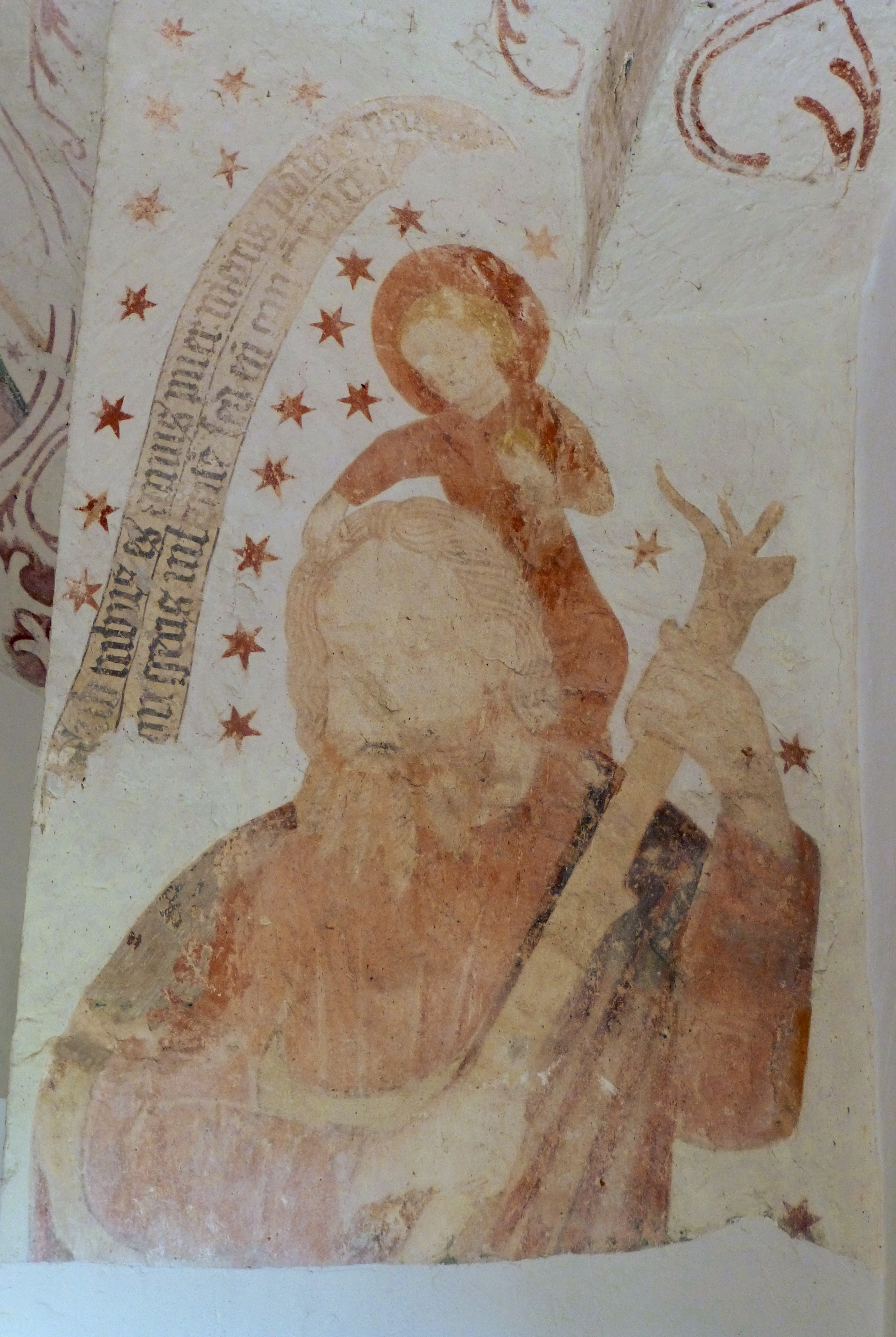 Gotische Fresken aus der Zeit um 1400 mit Darstellung des Heiligen Christophorus an der Wand der Eingangshalle der Kirche St. Christophorus, Reinhausen, Südniedersachsen.